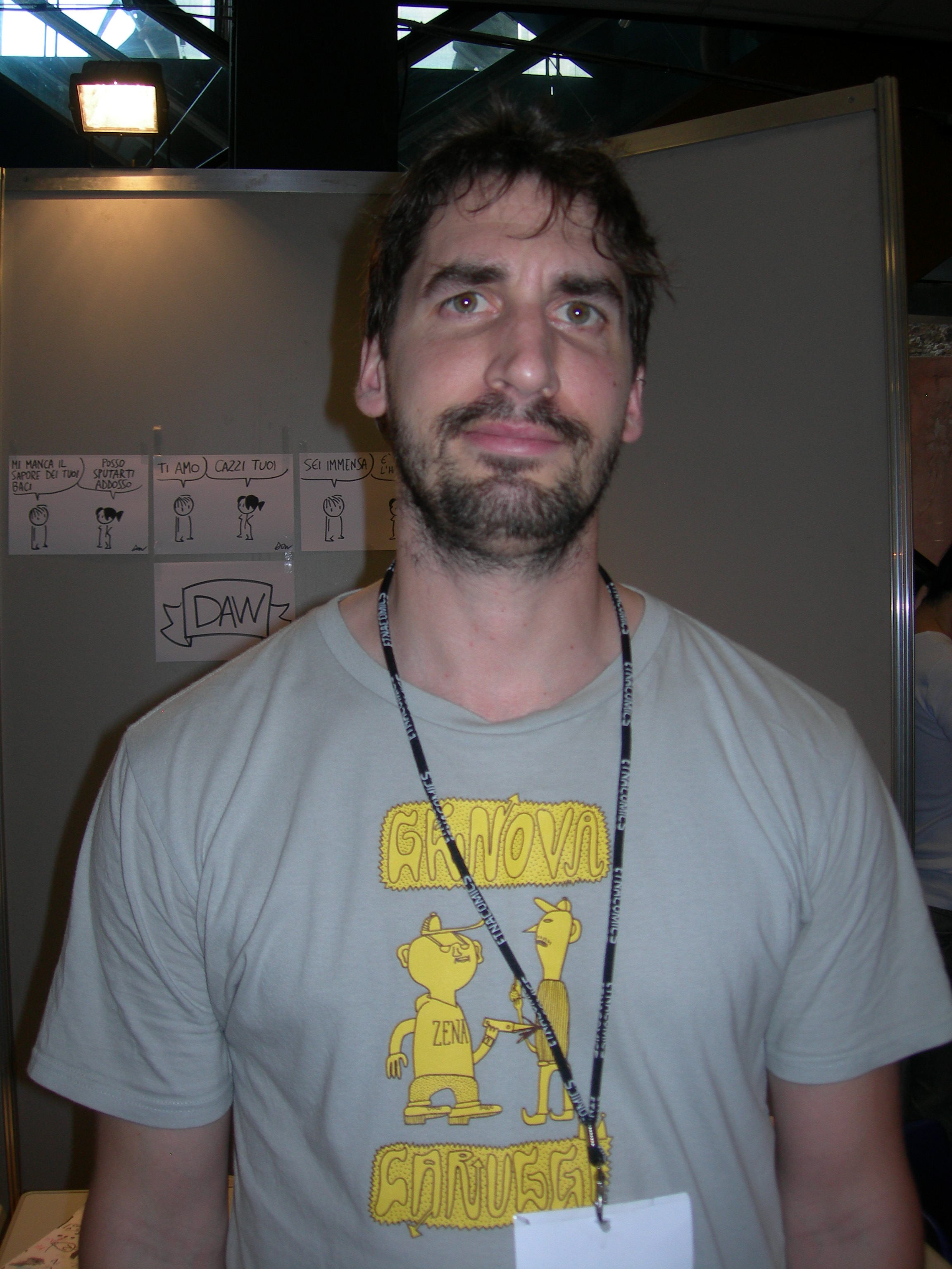 Davide Berardi a Etna Comics 2013, il 8 Giugno 2013, Centro fieristico le Ciminiere di Catania, Catania, Italia.